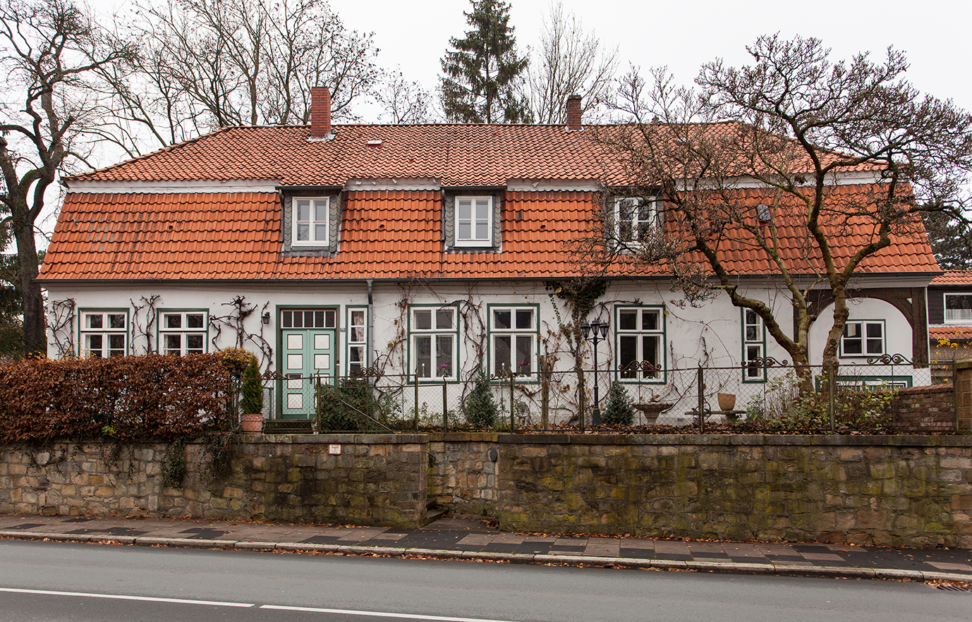 Herford, Stiftsbergstraße 23, das Pastorenhaus, in dem der Schriftsteller Hans Wollschläger aufgewachsen ist.